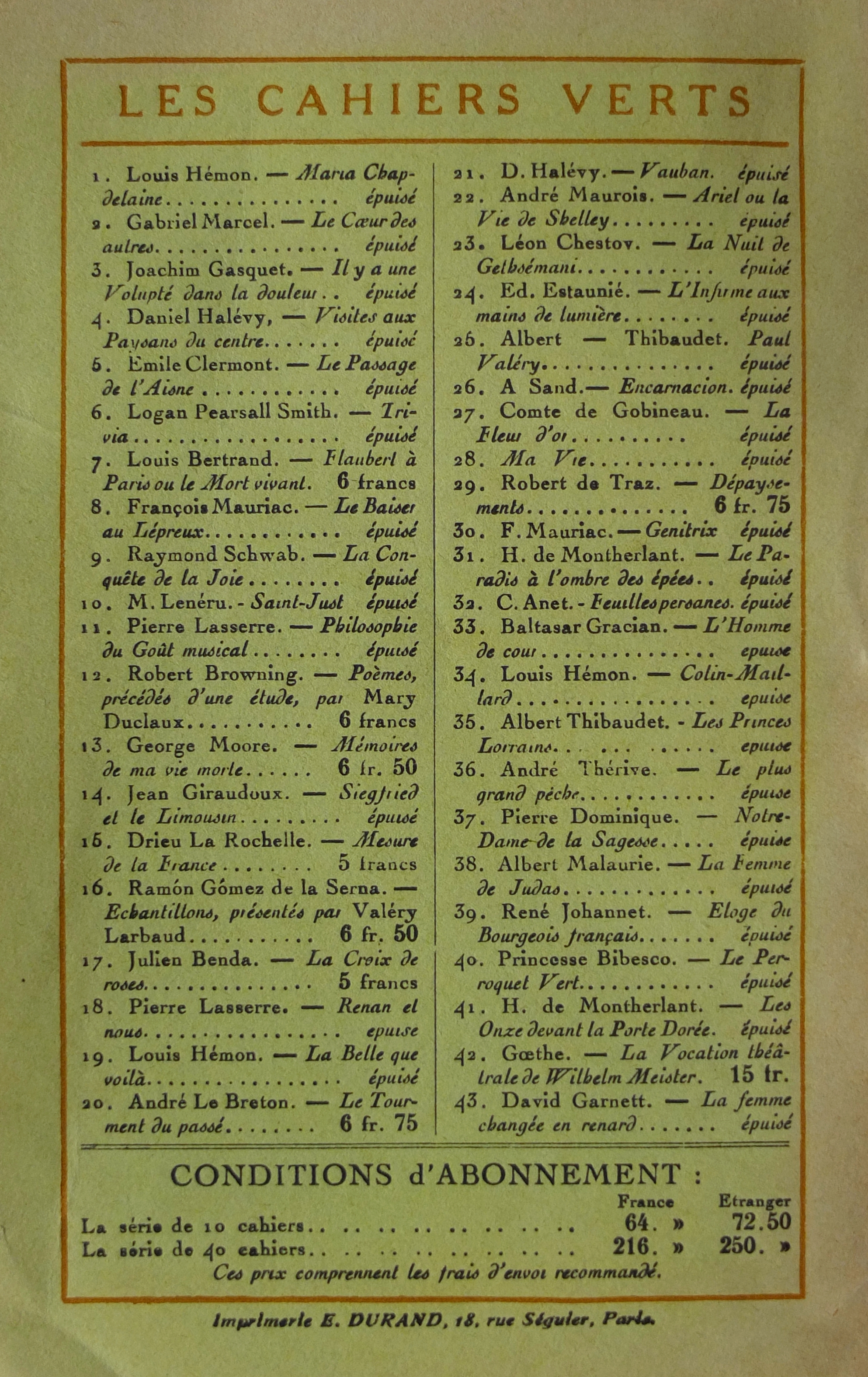 Dos du n°44 de la collection Les Cahiers verts aux éditions Grasset (Paris). Liste des 43 premiers titres édités entre 1921 et 1924.